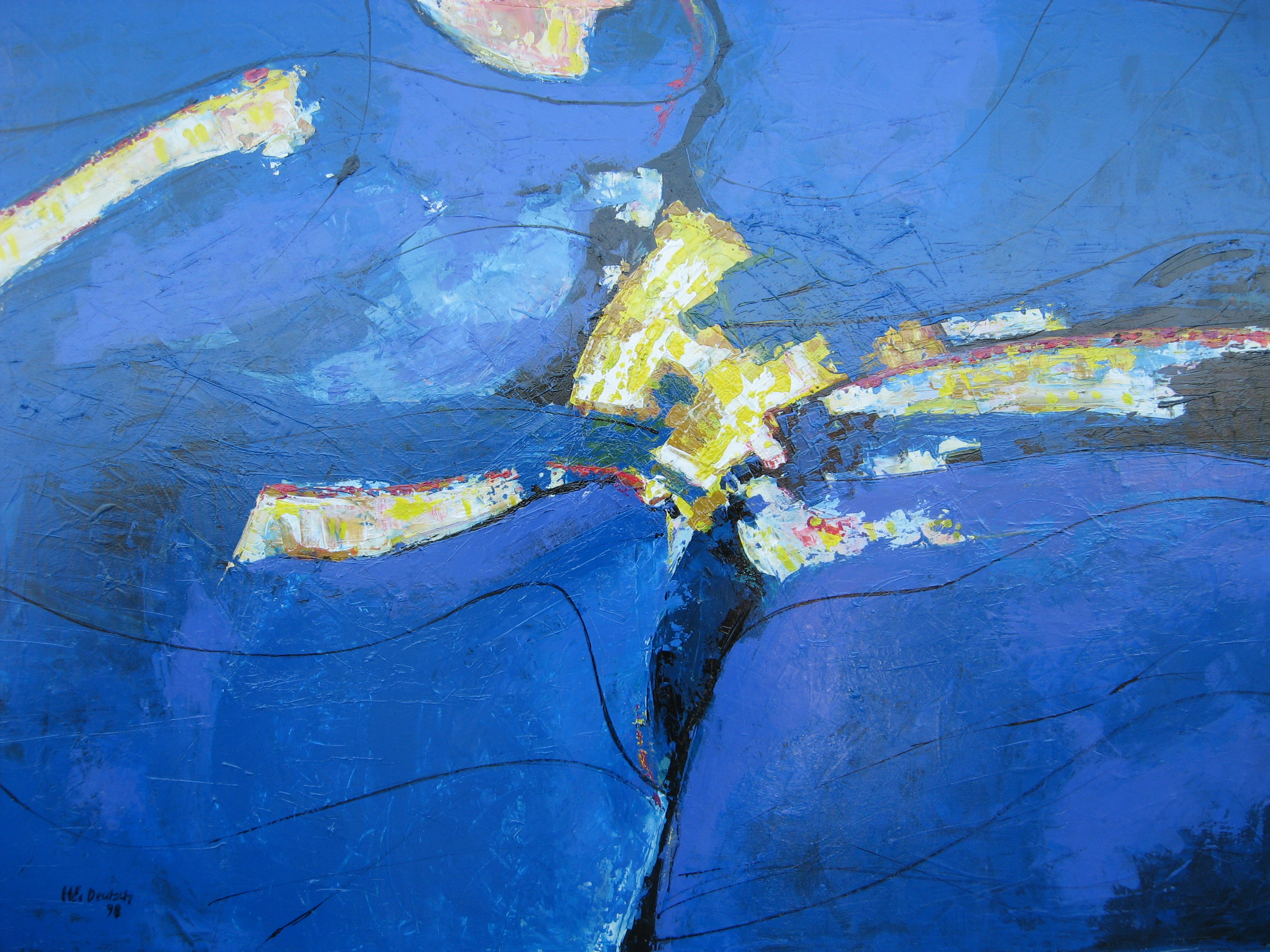 Abstrakte Komposition, 1998